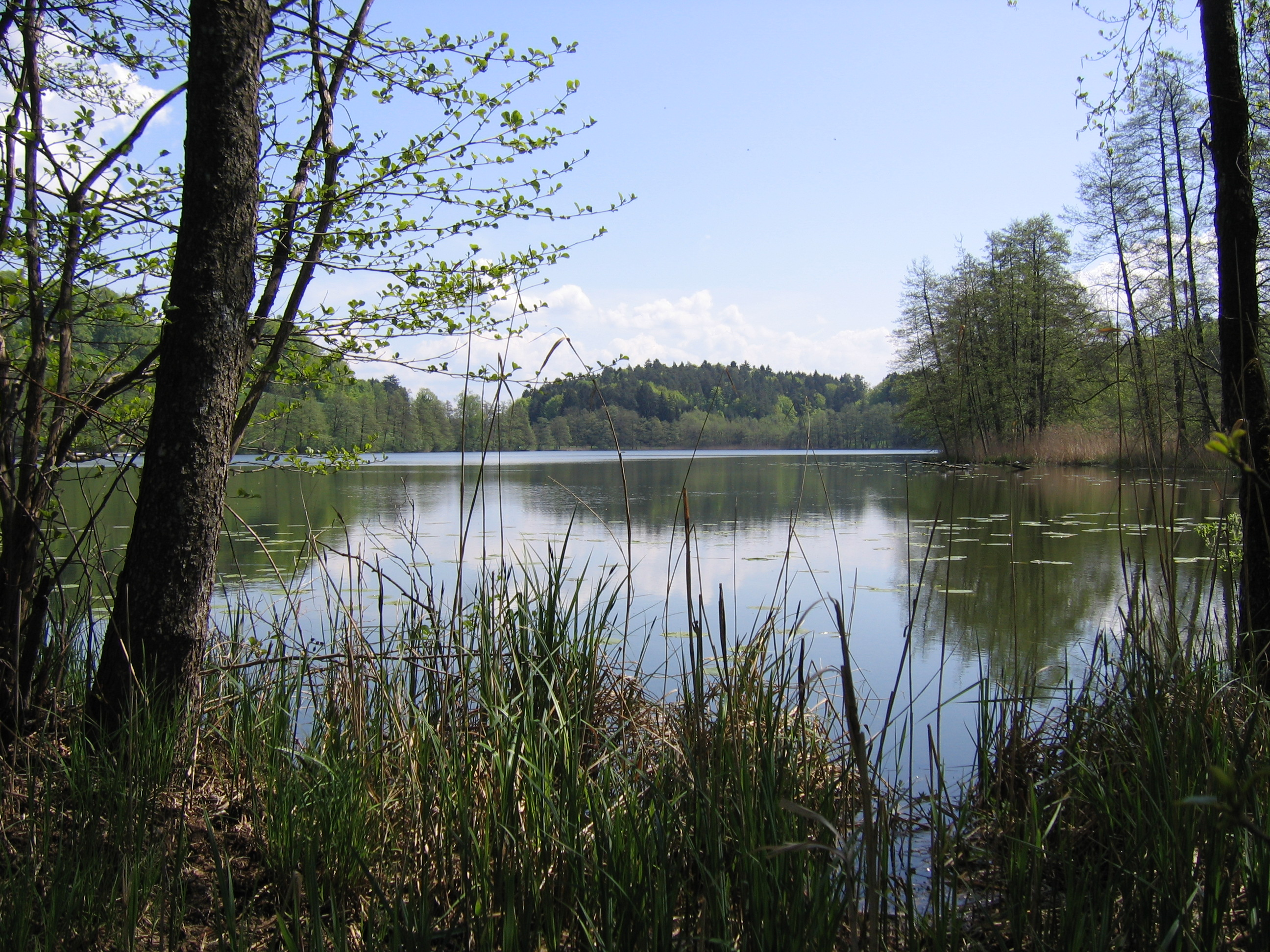 Deutschland - Baden-Württemberg - Bodenseekreis - Kressbronn am Bodensee - Schleinsee: der Schleinsee